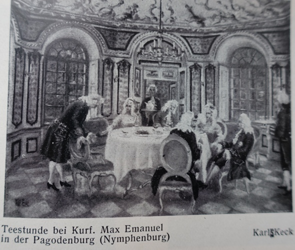 Fotographie aus dem ersten Band "Aus Münchner Künstler Ateliers" von Johann Karl, 1929